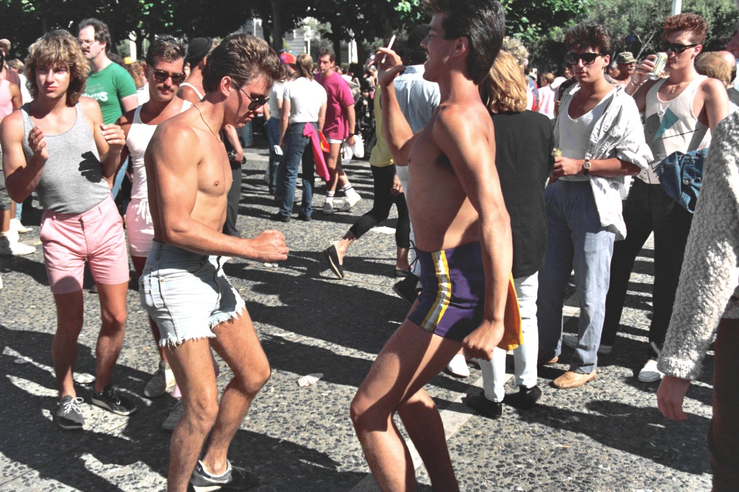 San Francisco, June 1986